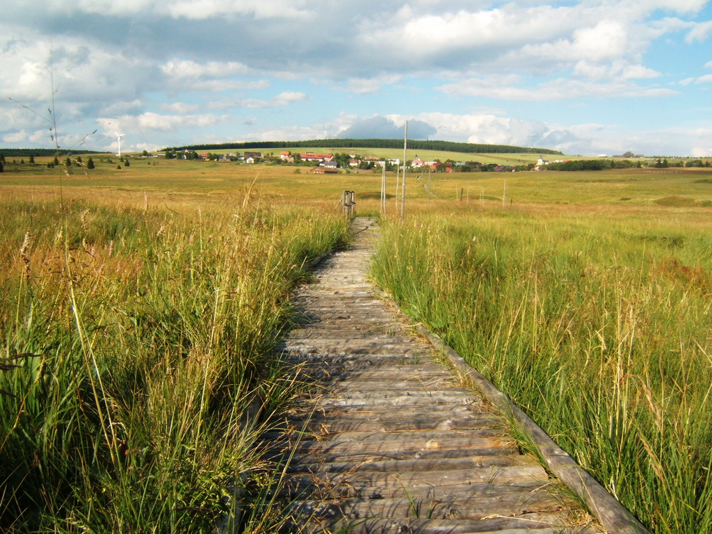 Božídarské rašeliniště near Boží Dar, Ore Mountains, CZ